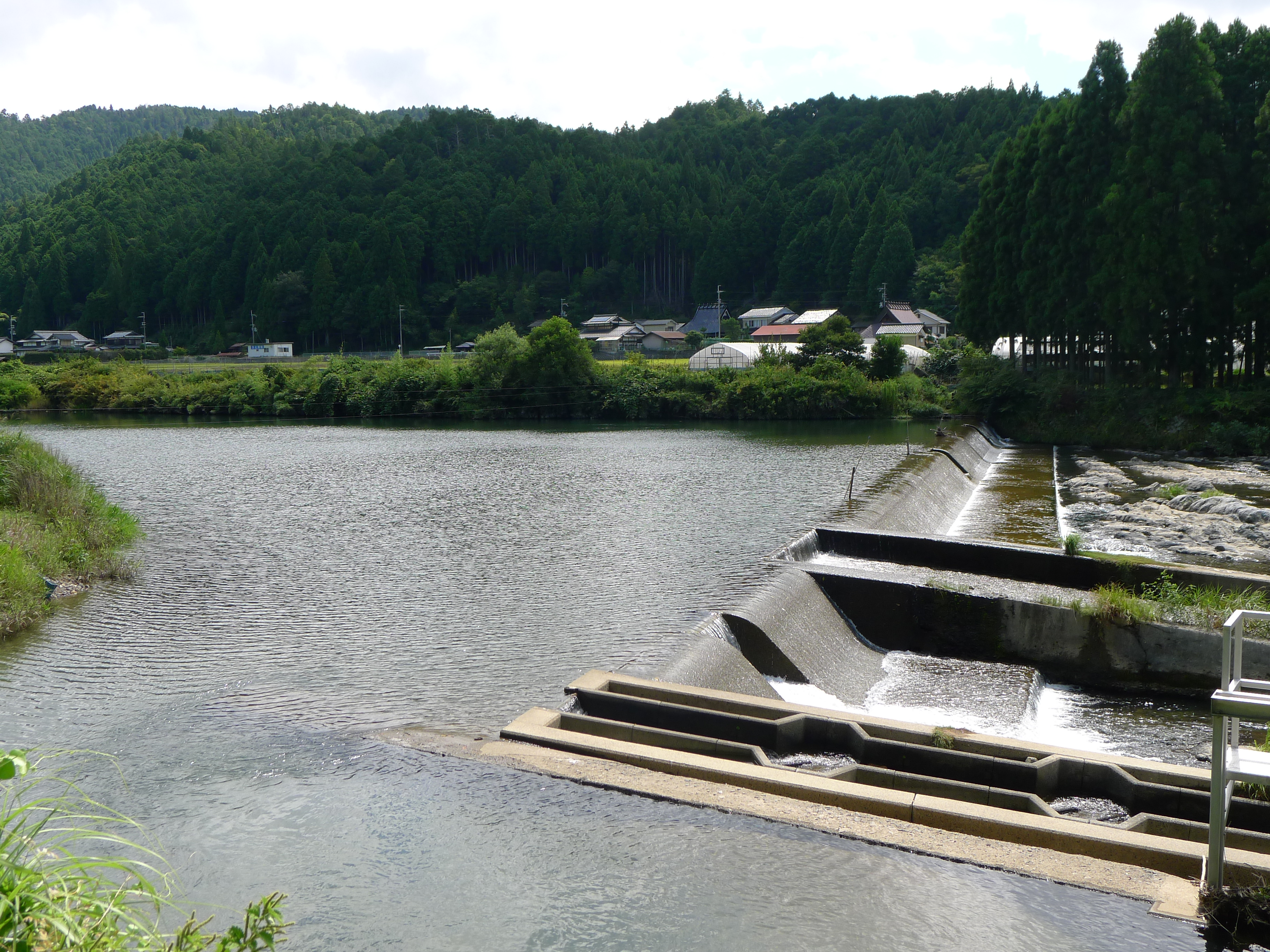 桂川中流域（京北・周山）の堰・魚道・農業用水路分岐